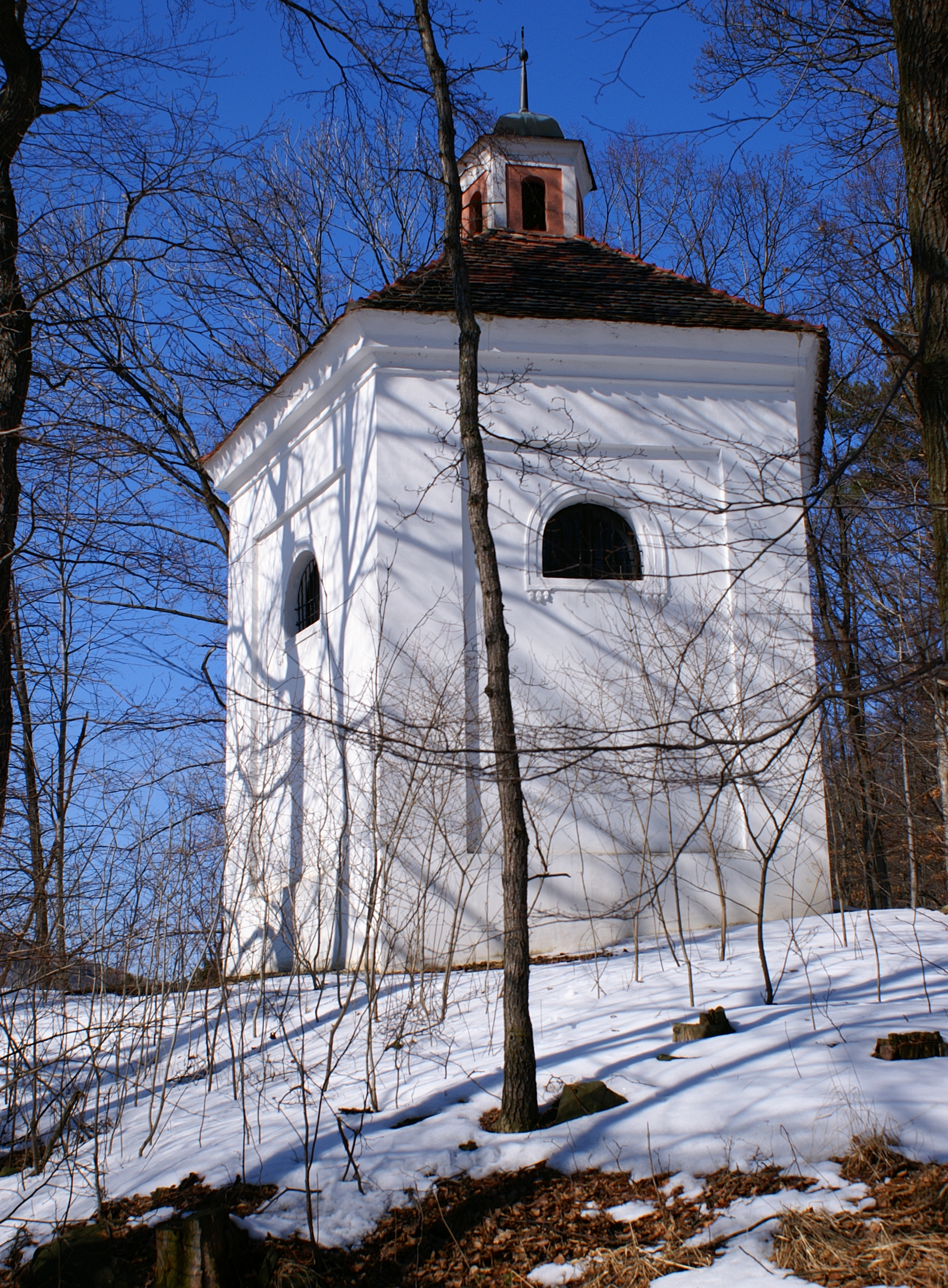 Kaple svaté Máří Magdaleny u Tašova v Českém středohoří (okres Ústí nad Labem) z roku 1707.